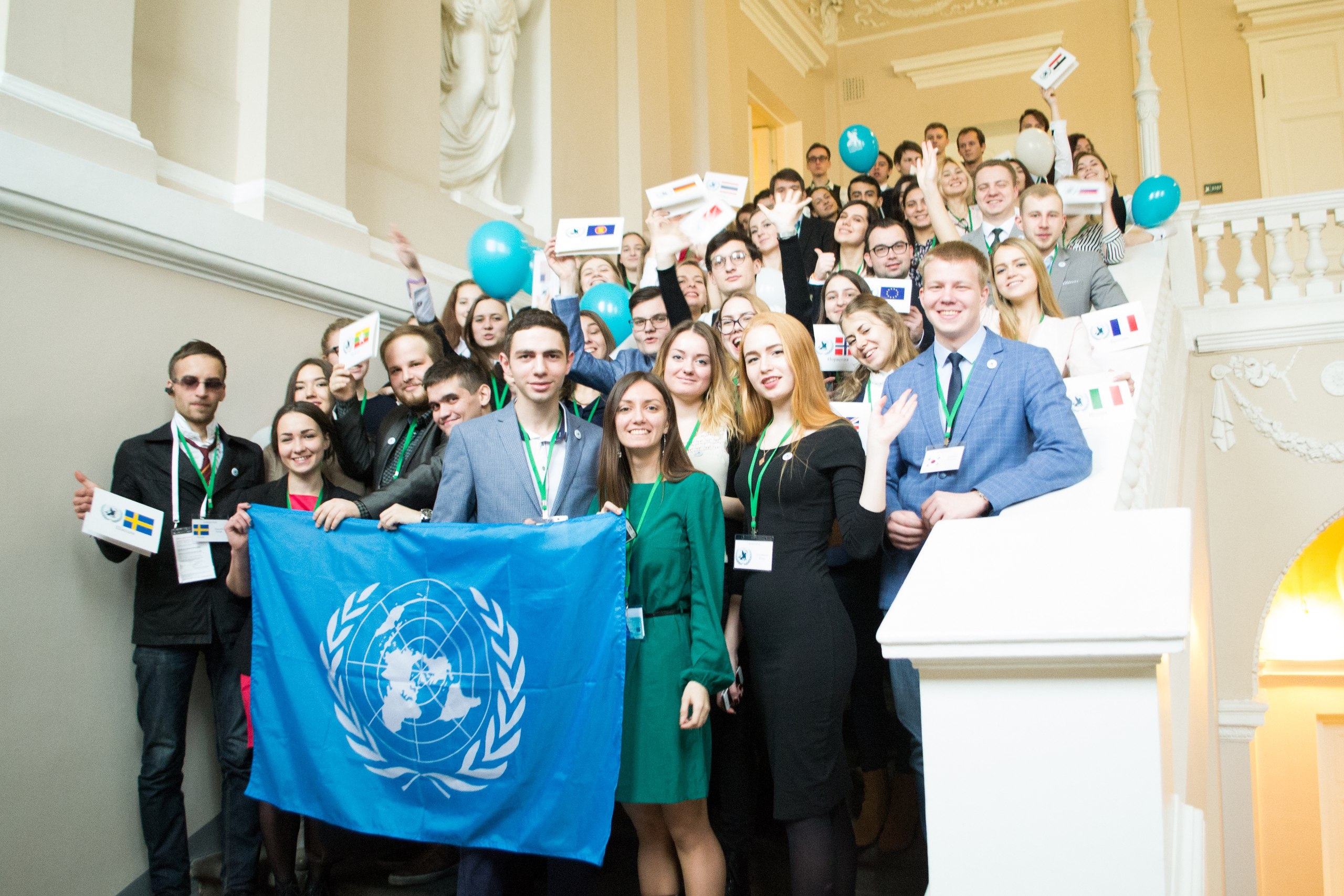 После принятия резолюции во всех комитетах, моделисты собрались у административной лестницы СПбГЭУ для общего фотографирования